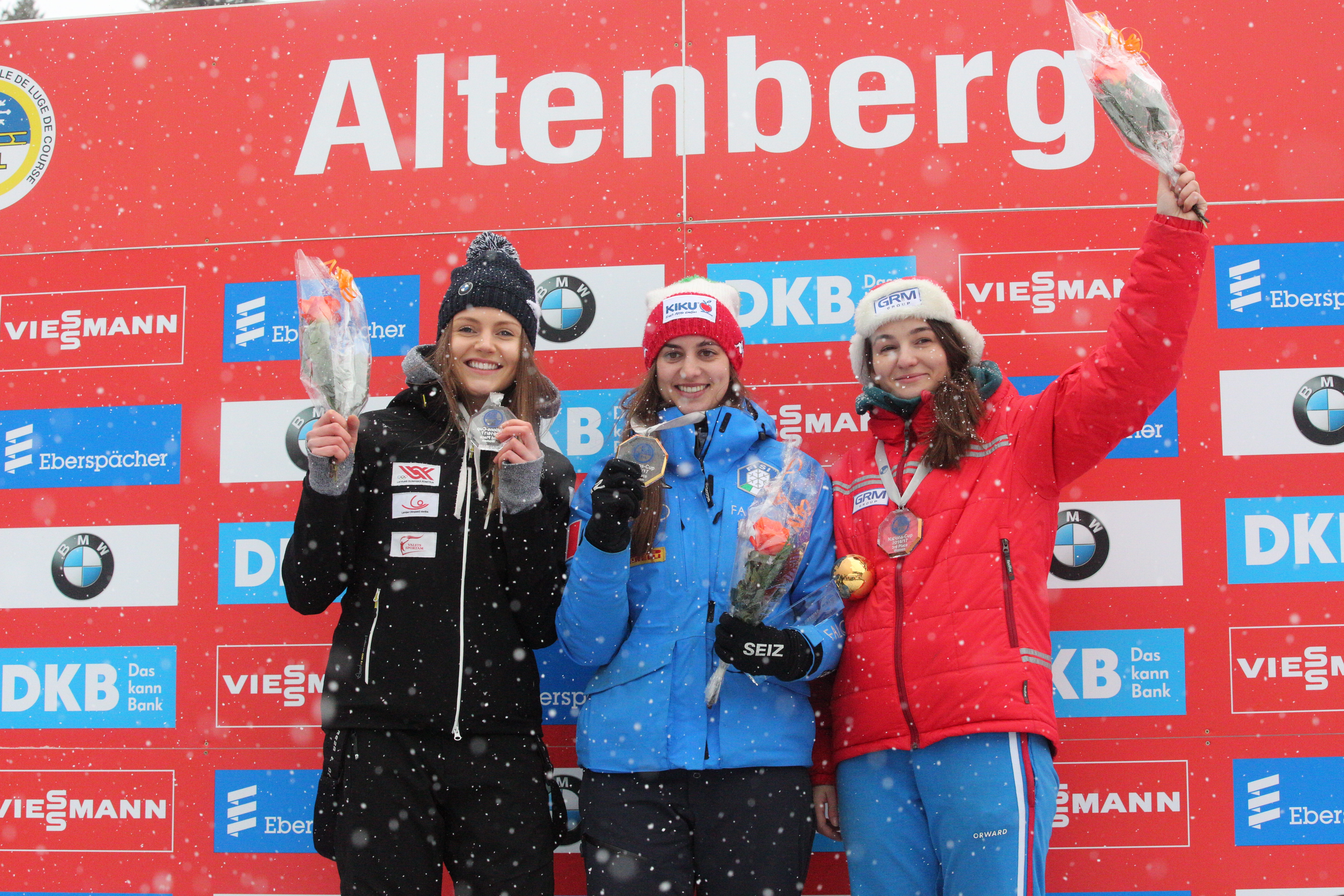 Siegerehrung Gesamtwertung Rennrodel-Nationencup der Damen: Ulla Zirne (2. Platz), Andrea Vötter (1. Platz), Ekaterina Katnikova (3. Platz)